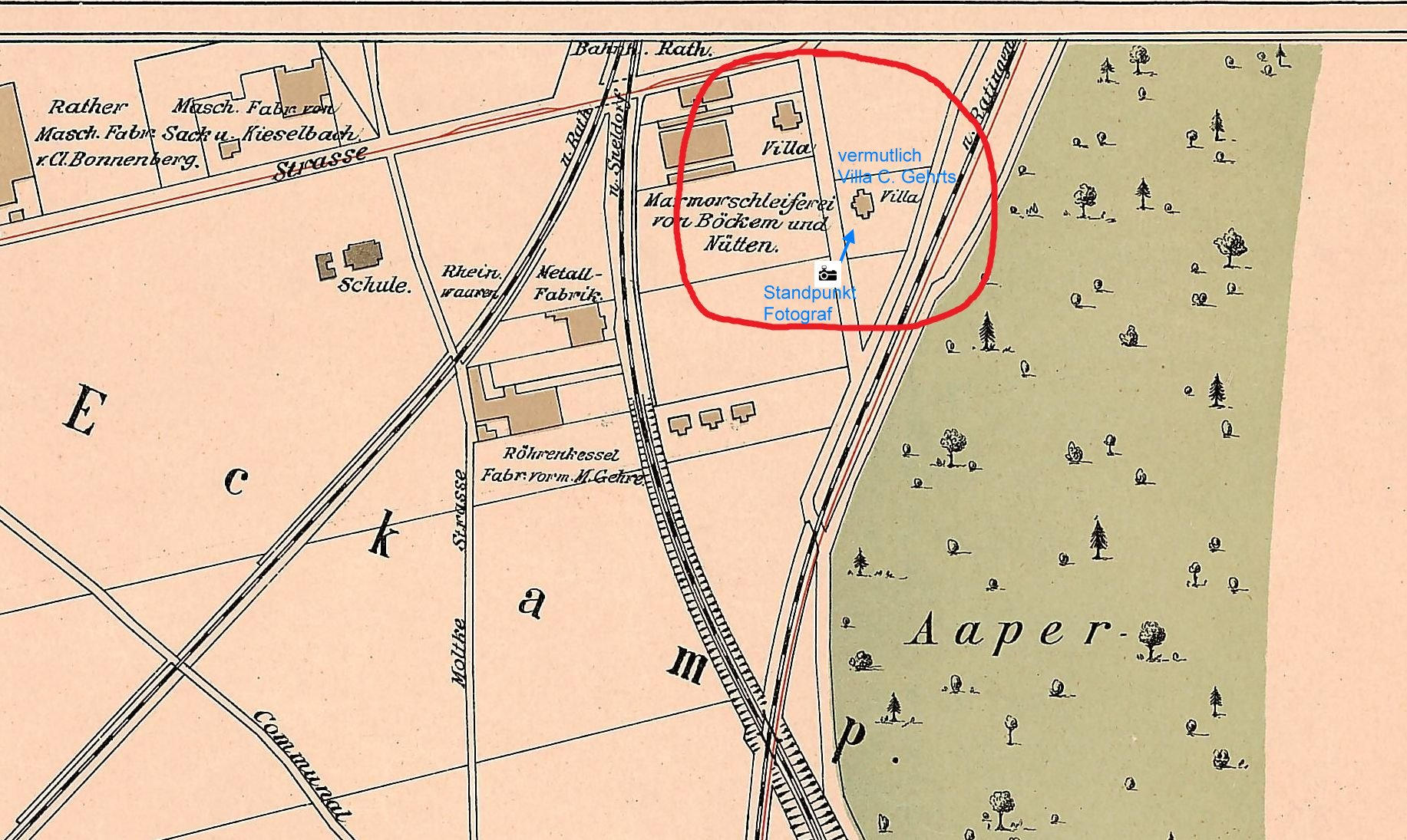 Kartenausschnitt Düsseldorf-Oberrath von 1902. Ehemalige Lage der Villa von Karl Heinrich Julius Gehrts.